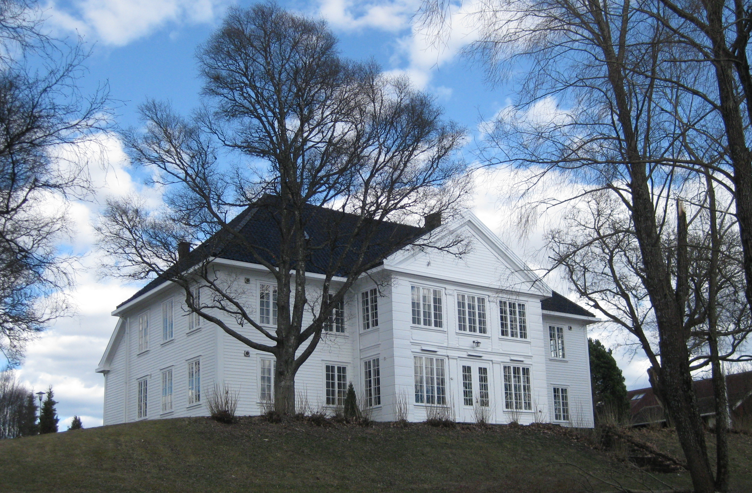 Det Gamle Herredshuset på Lillerommen, Vormsund.